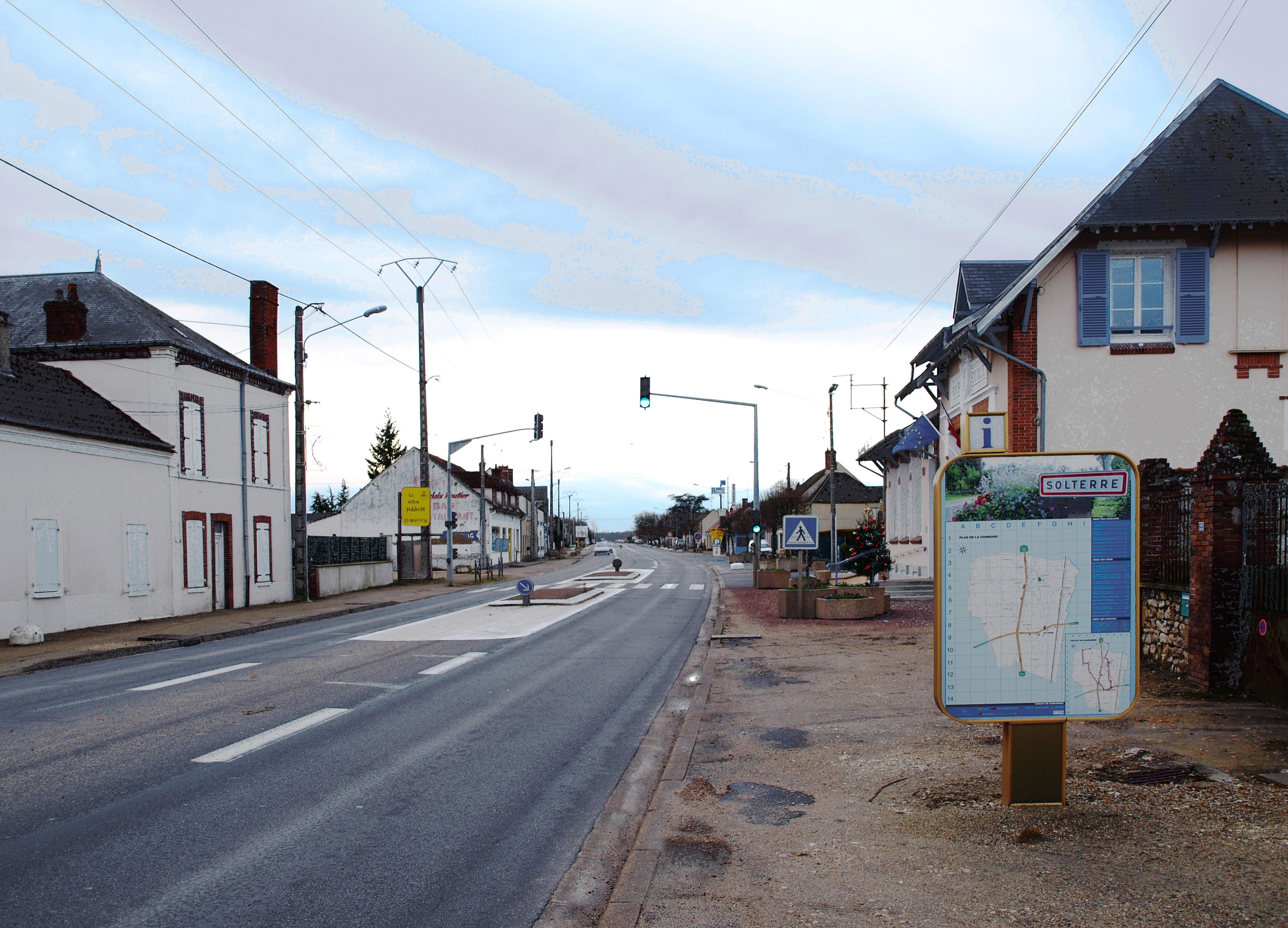 Solterre (Loiret, France) , La Commodité (sur l'ancienne RN7) , la route jadis Route nationale 7